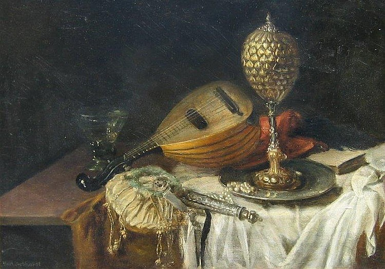 Stillleben mit Mandoline